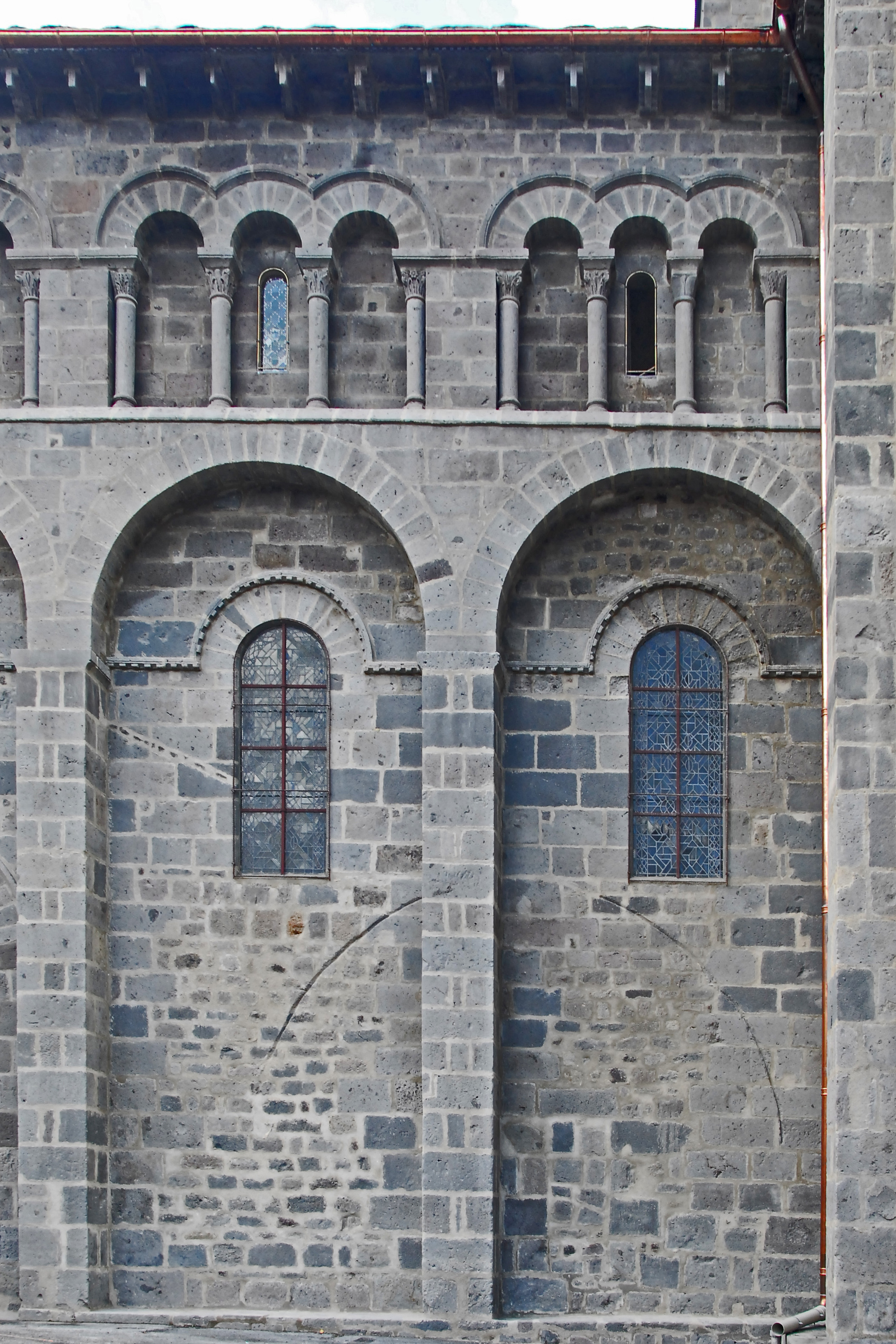 N.-D.d'Orcival, Langhaus, Südwand, 2 Blendarkaden